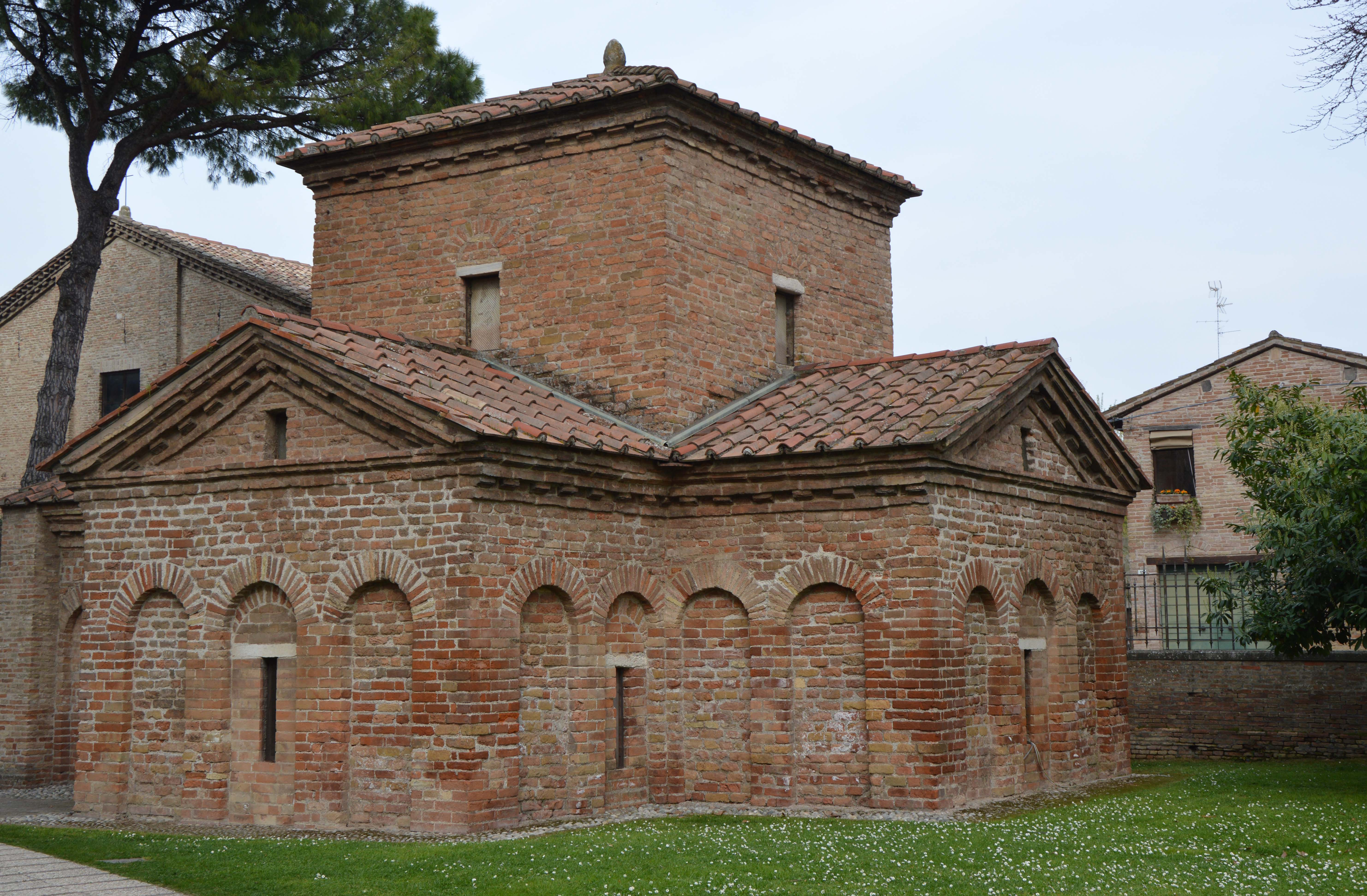 esterno This is a photo of a monument which is part of cultural heritage of Italy.